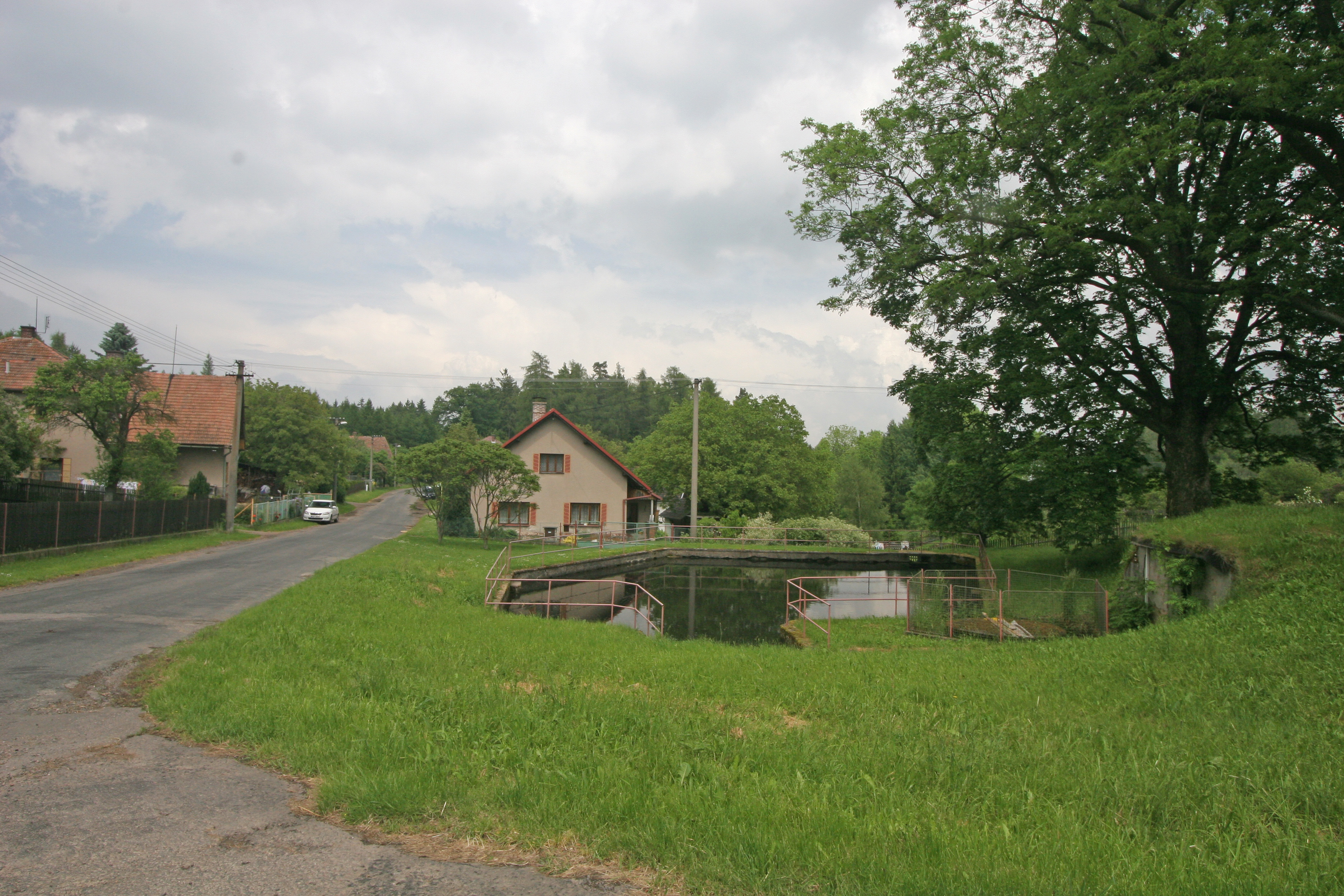 Rtenín návesní rybníček1